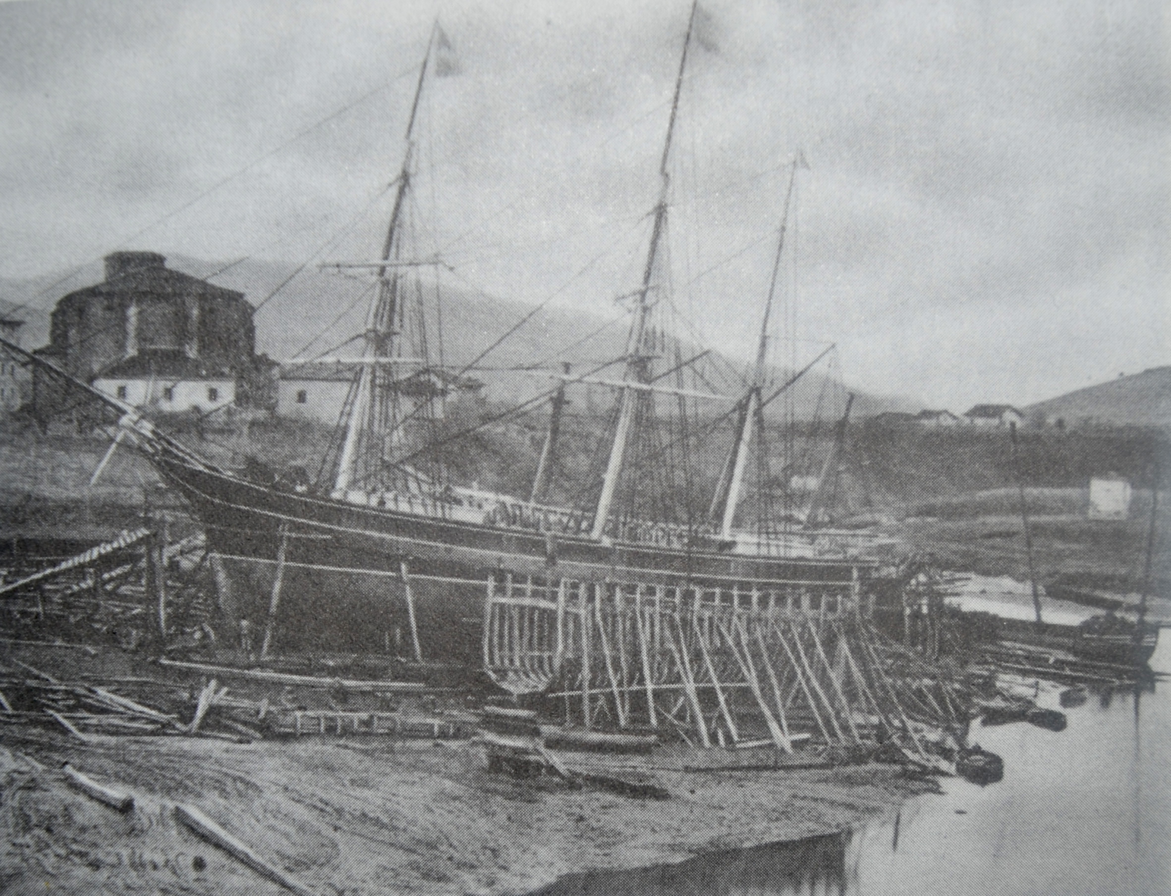 Aranatarren Abandoko ontziola bat. - Arana family's shipyard in Abando.